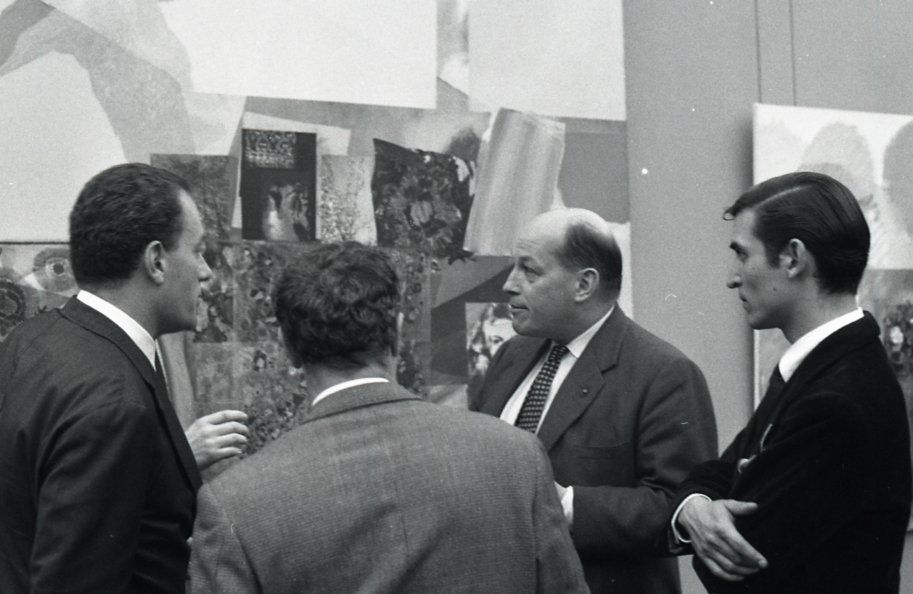 Servizio fotografico : Milano, 1962 / Paolo Monti. - Strisce: 6, Fotogrammi complessivi: 34 : Negativo b/n, gelatina bromuro d'argento/ pellicola ; 35 mm. - ((I fotogrammi hanno una doppia numerazione. . - Sul portanegativi: Leica HP3. - Occasione: Inaugurazione della mostra Continuità presso la Galleria Levi. - Fonte: Agenda di Paolo Monti: Foto Leica 1 / 1-51 verde, 1-110 nera (1958-1963), presso Archivio Paolo Monti